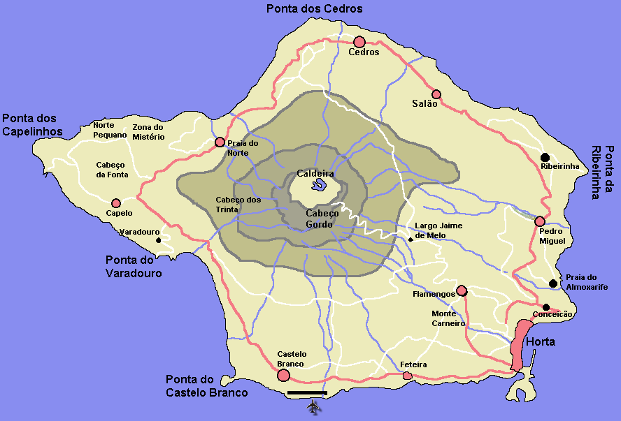 Karta över Faial i ögruppen Azorerna. Ritad av Användare:Chrizz.